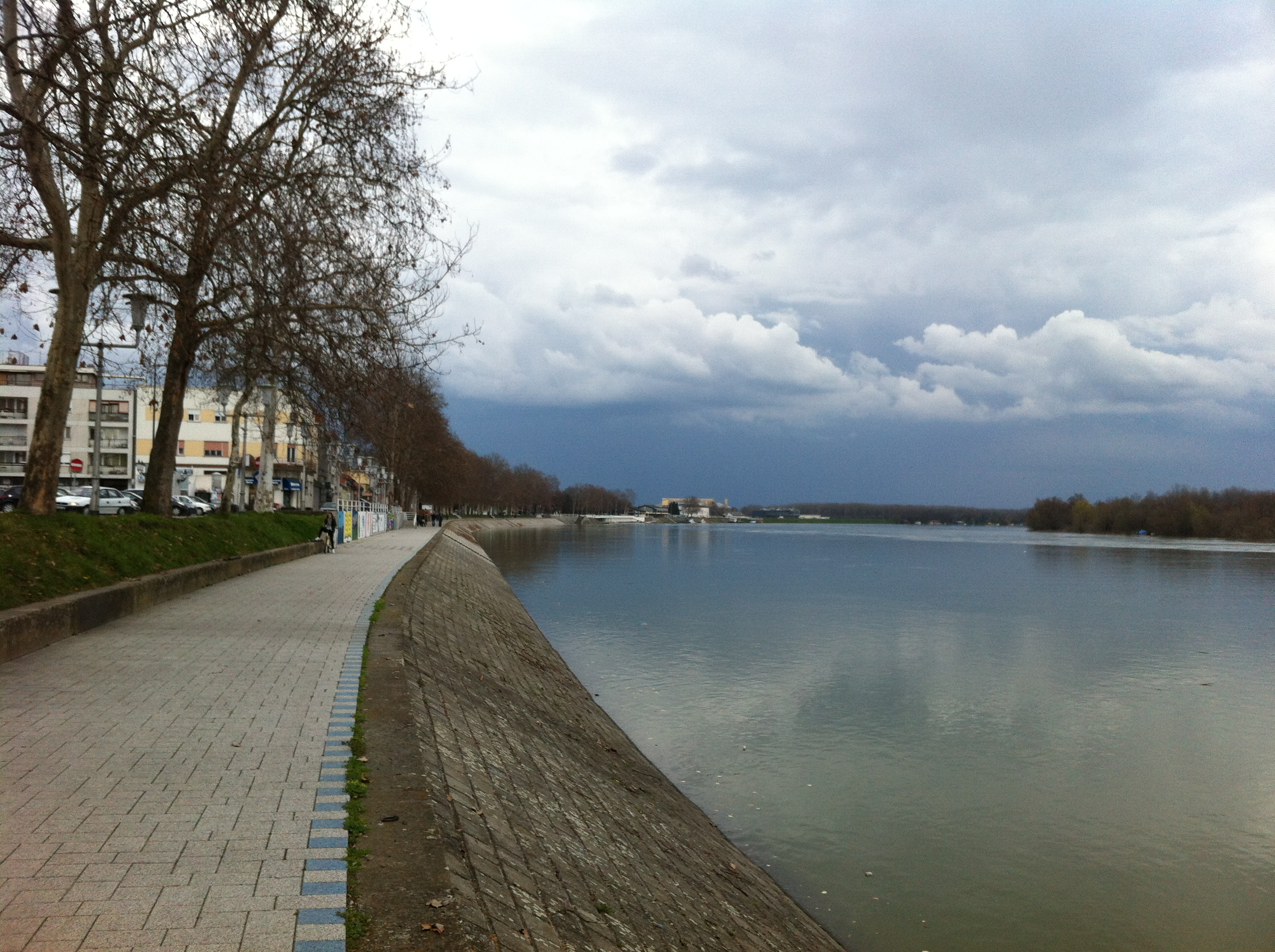 Slavonski Brod, Croatia